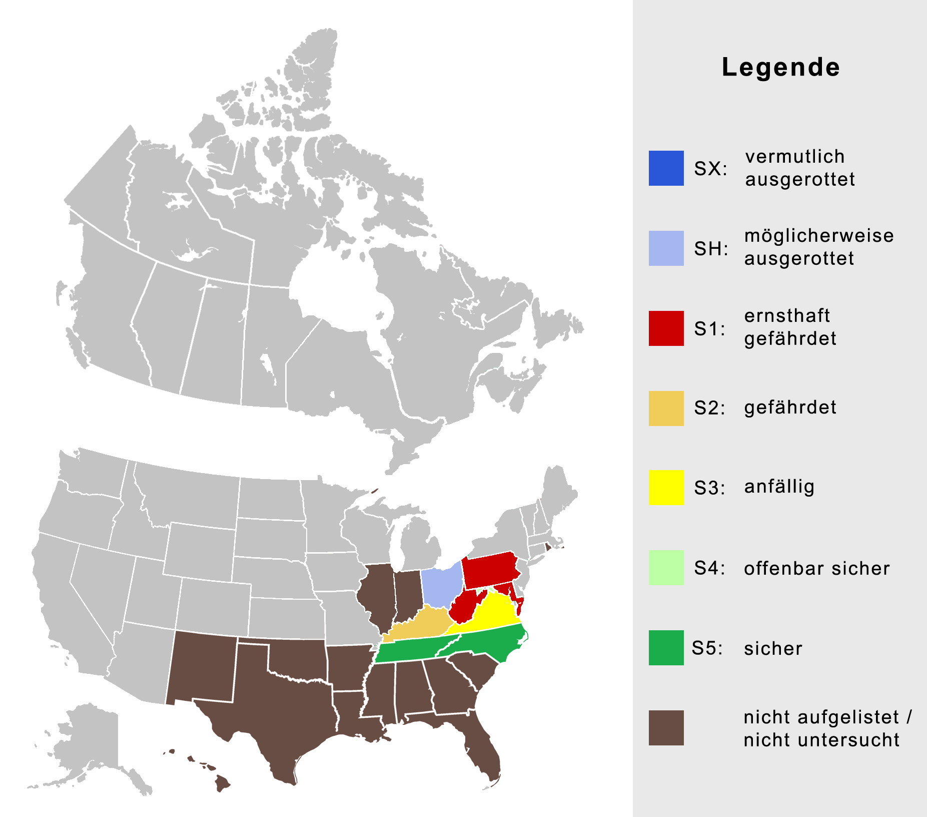 Schutzstatus der Wanderlibelle in Nordamerika basierend auf [1] und File:Wanderlibelle schutzstatus nordamerika.png von c.ling